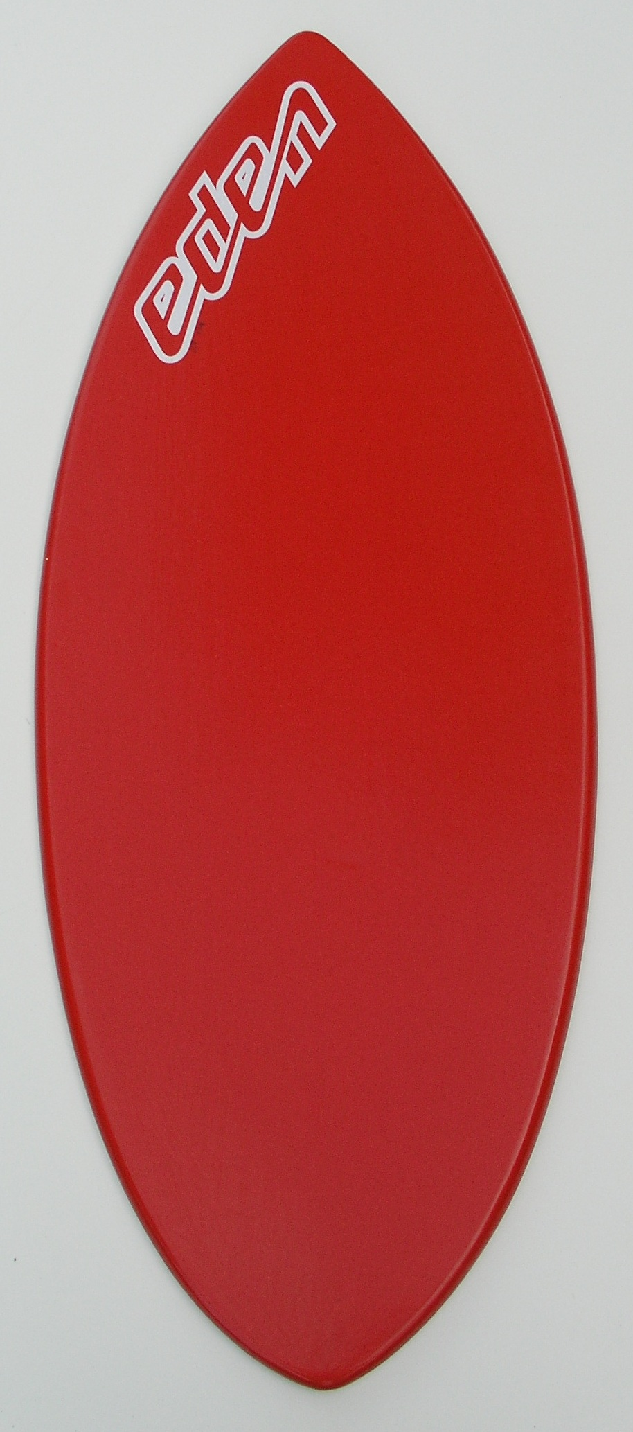 Skimboard en matériaux composites (sandwich mousse PVC + fibre de verre et résine polyester) de 134x52cm